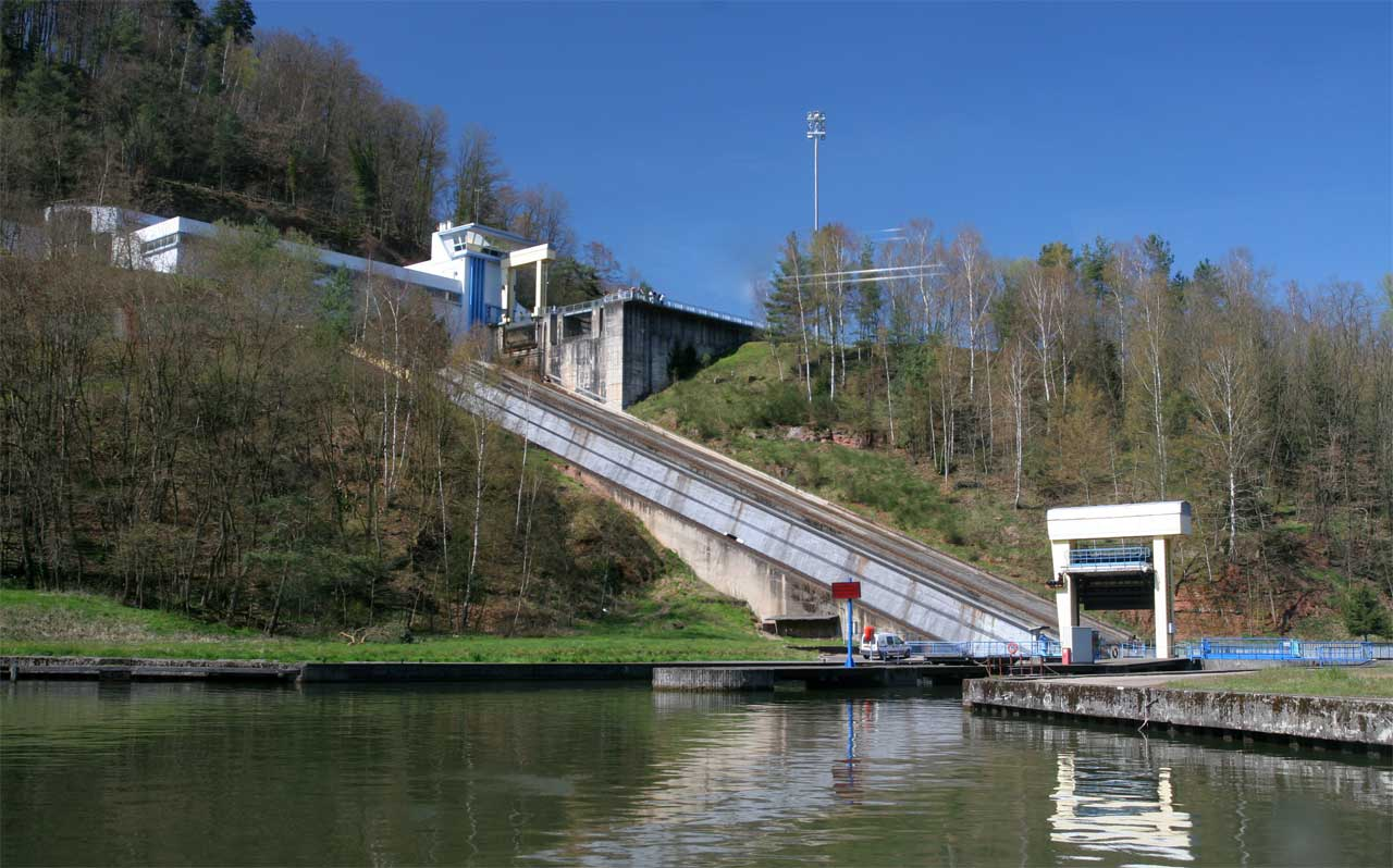 Schiffshebewerk Arzviller - Plan Incliné